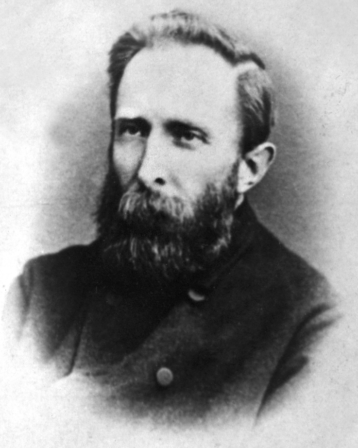 Dr. phil. Ernst August Bardey